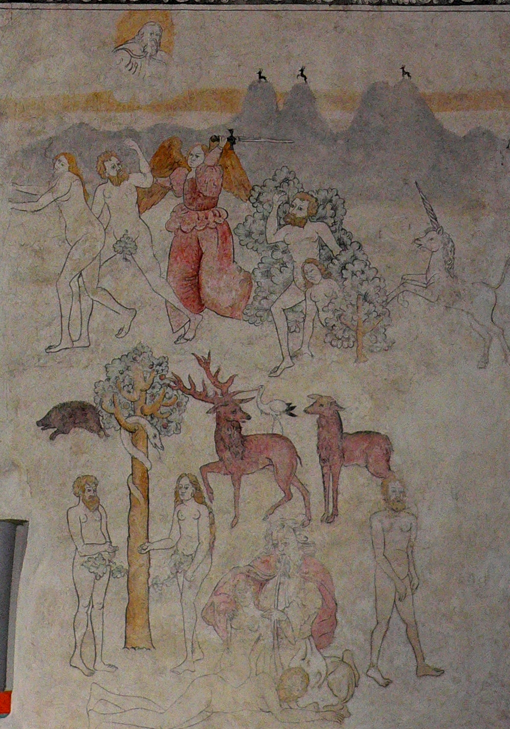 Evangelische Kirche St. Laurentius in Dassel, Niedersachsen, Deutschland - Protestantische Renaissancemalerei (Secco): "Die Vertreibung aus dem Paradies" von 1577